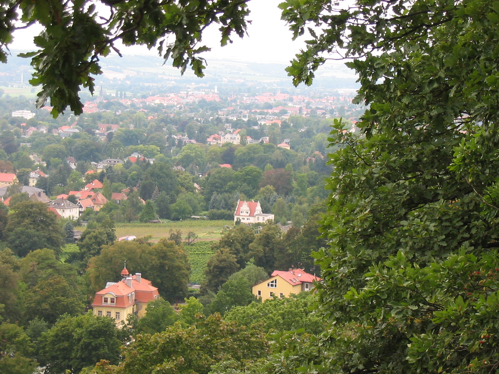 Radebeul Albertsburg und Bennoschlösschen